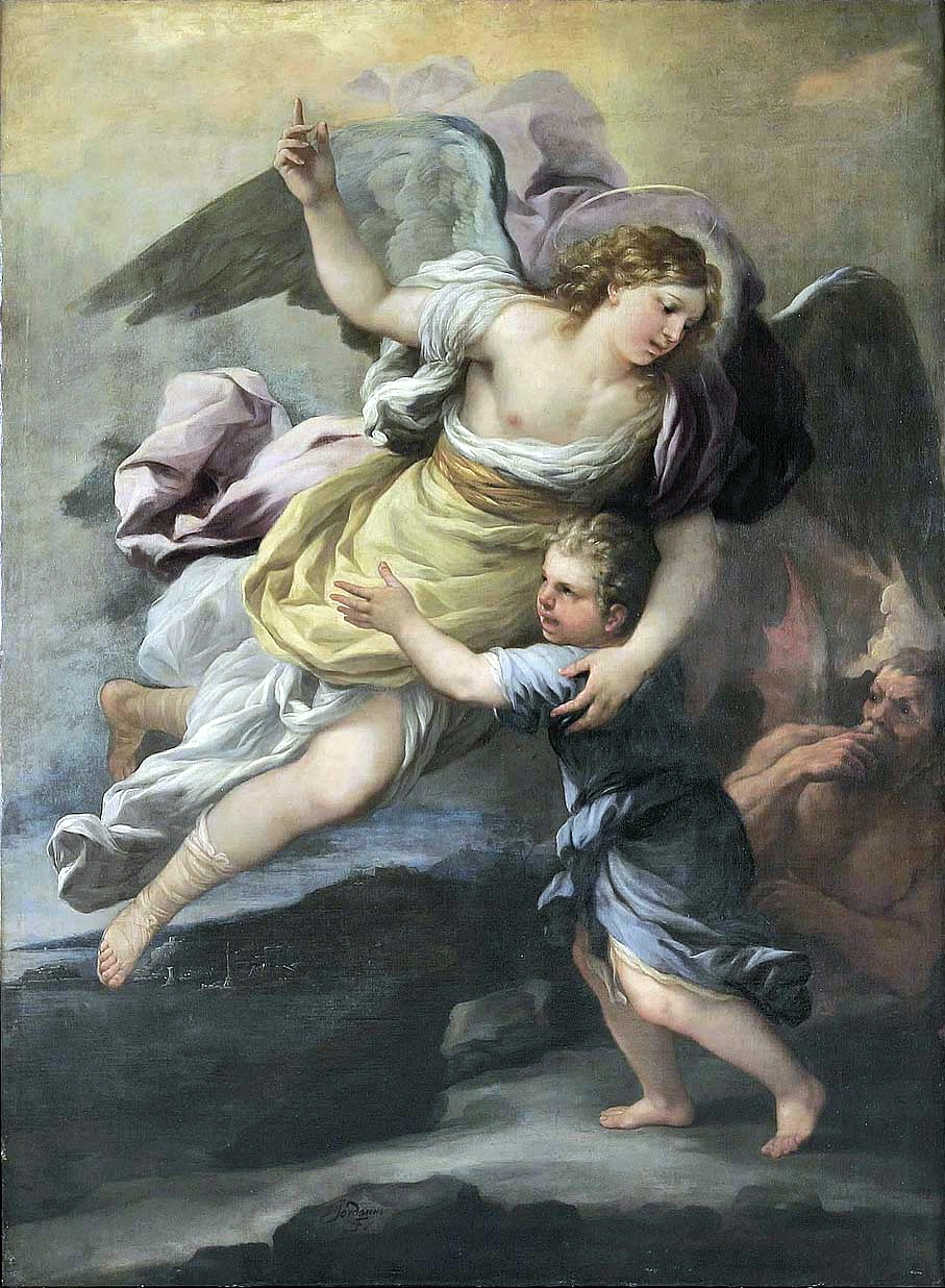 Guardian angel